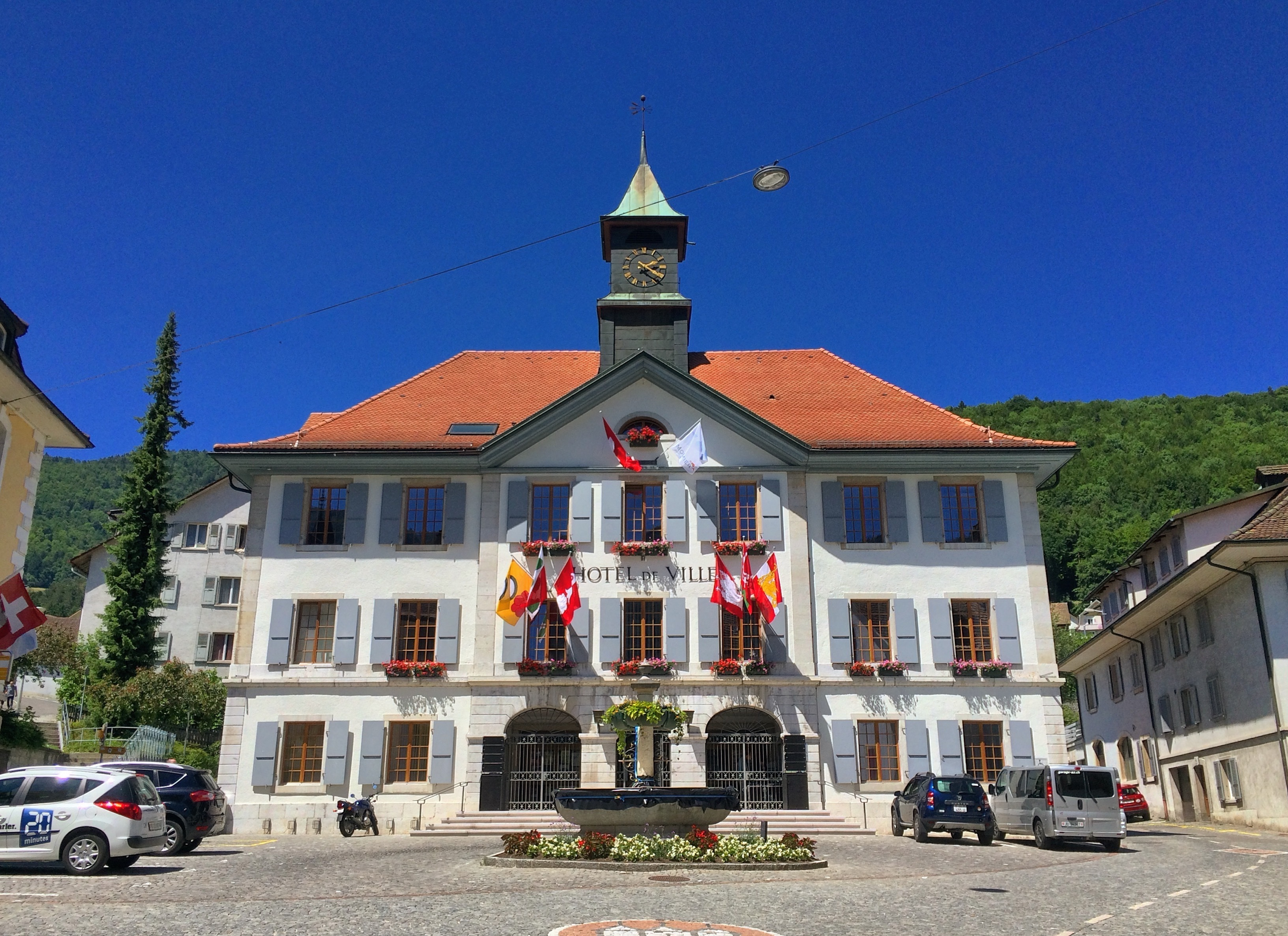 L'Hotel de Ville de Moutier, dans le canton du Jura.